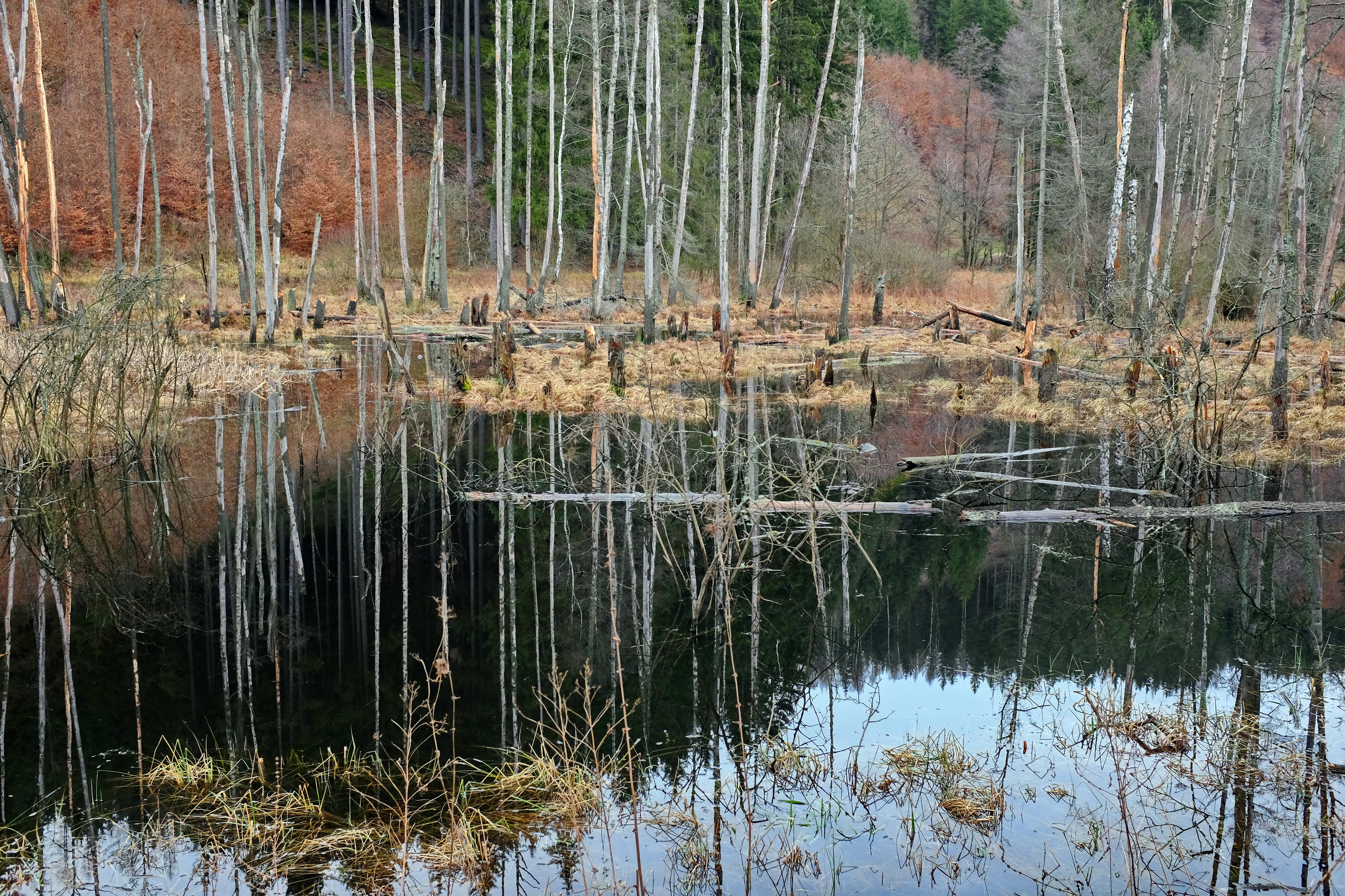 Bystřina, zaniklá osada ve Slavkovském lese, močály u Dorschnerova mlýna